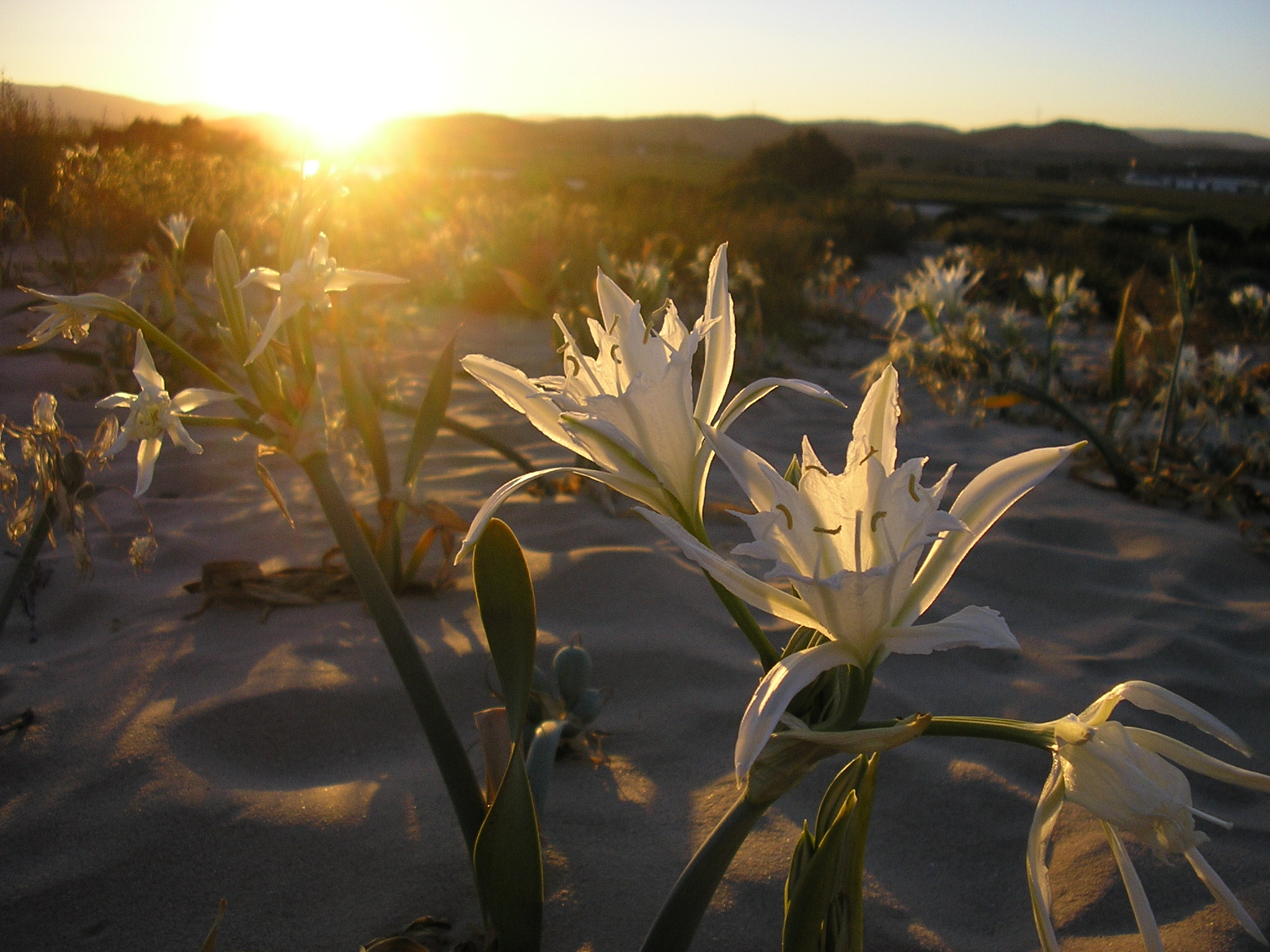 Pancratium maritimum, fotografía realizada en las dunas del Paraje natural de las marismas del Río Palmones en Algeciras (España)